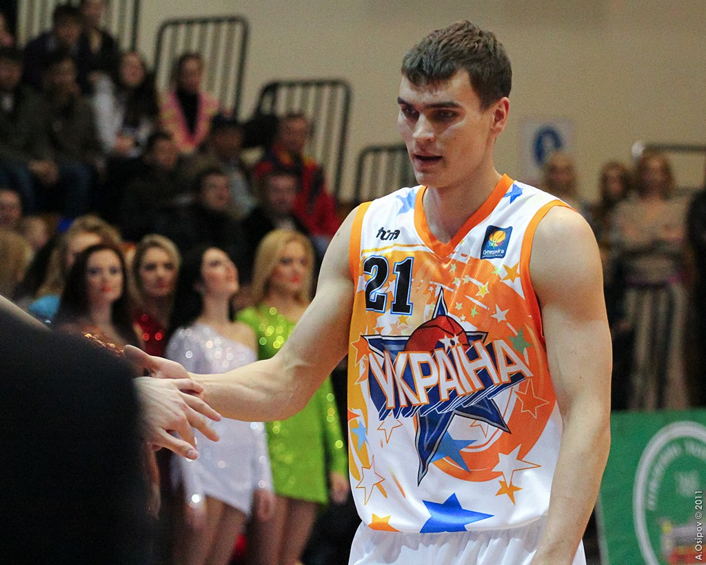 Максим Пустозвонов / Maksym Pustozvonov